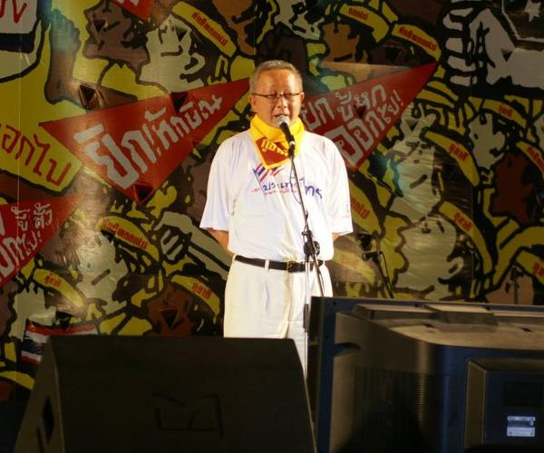 Sondhi Limthongkul speaking at a mass rally